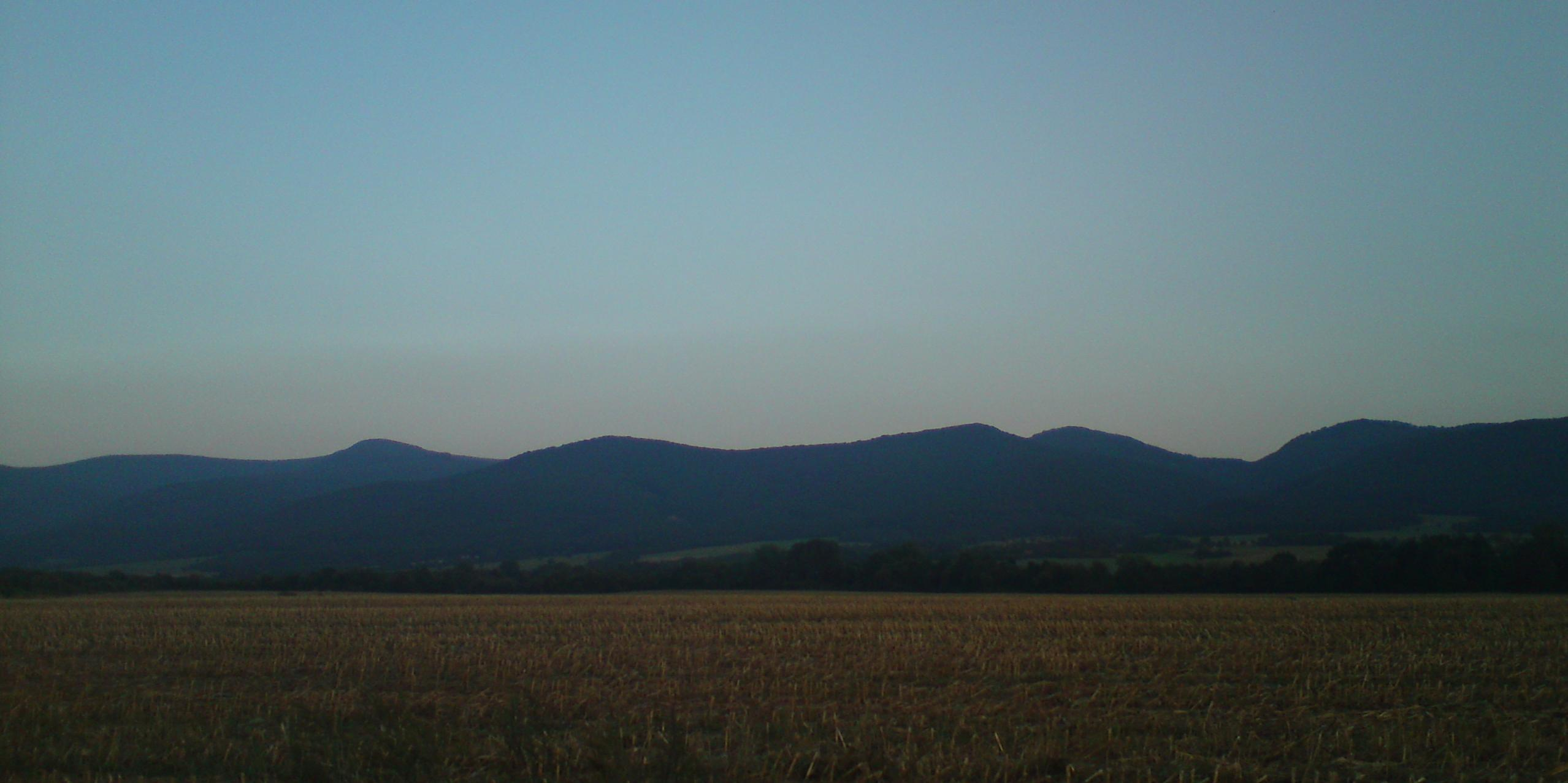 Pohorie od Bystričian (od západu)